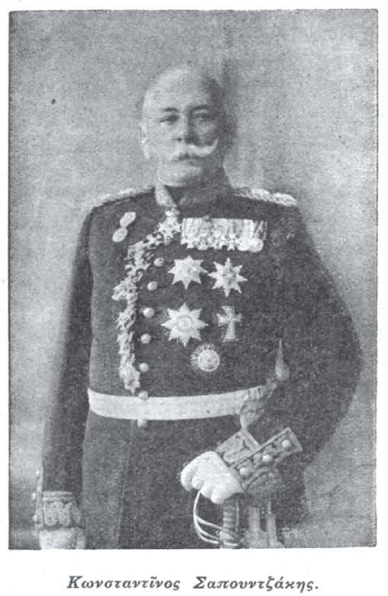 Griechischer Militär